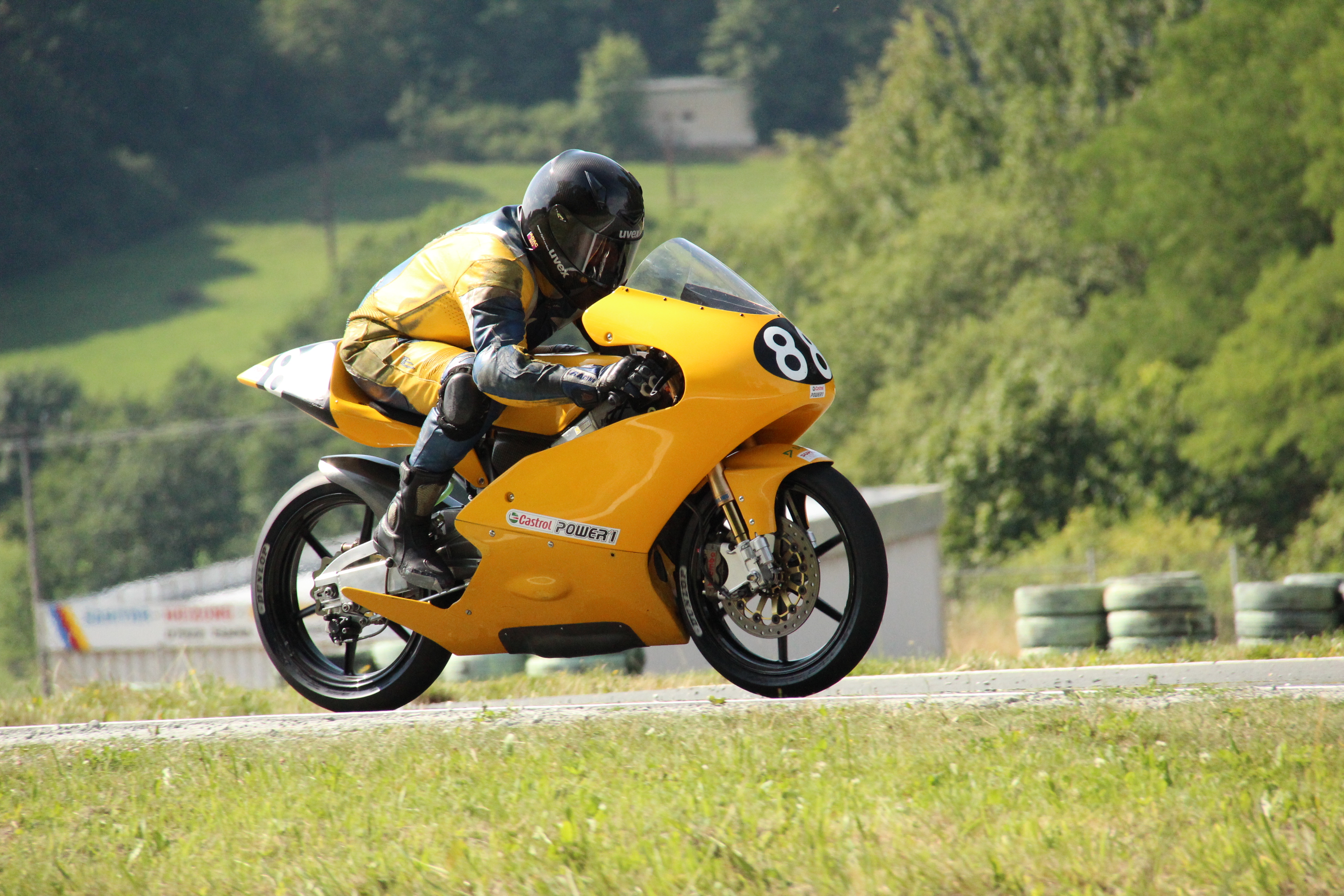 Reiner Scheidhauer in Schleiz 2014, IG Königsklasse 125ccm